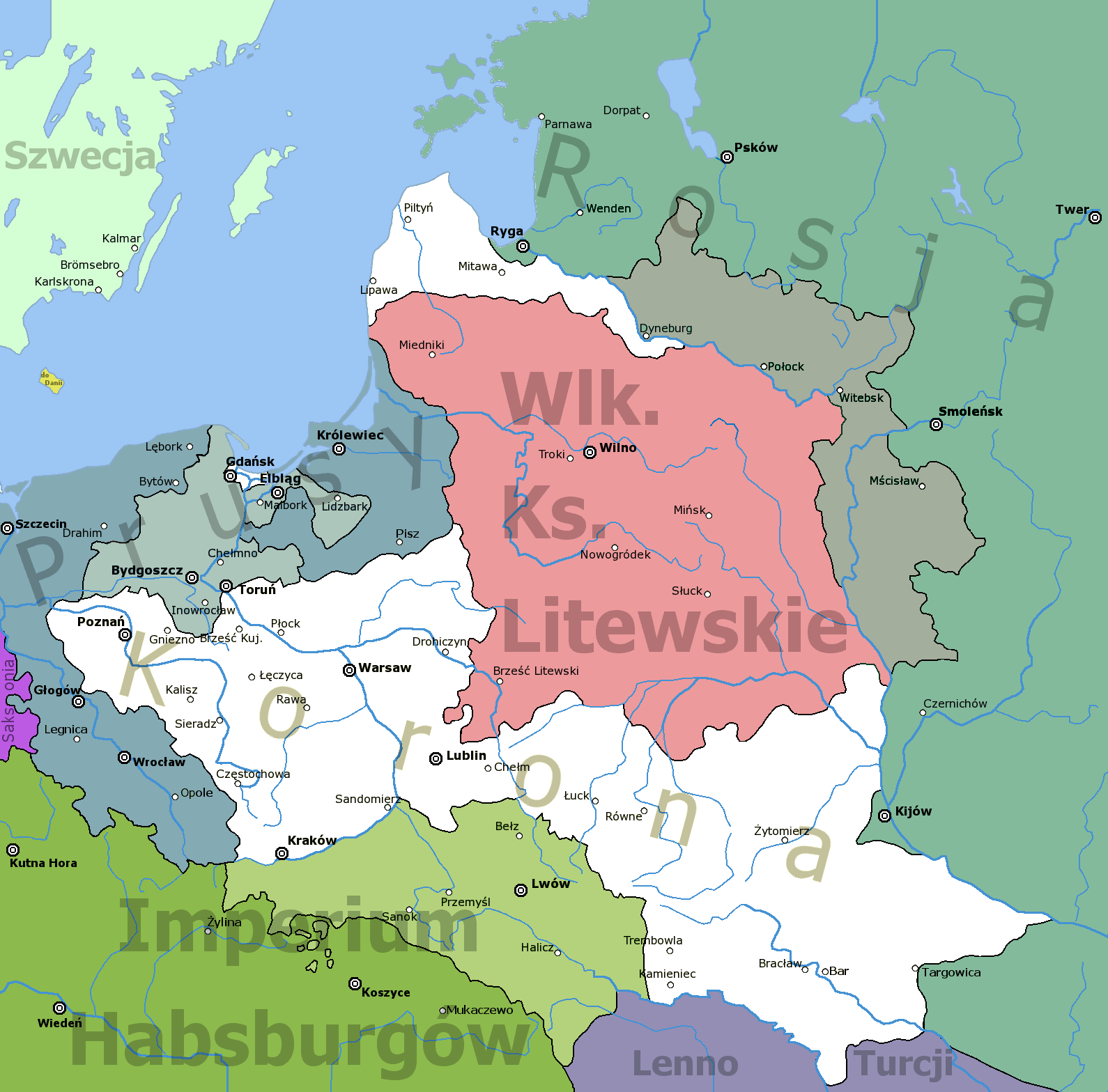 Rzeczpospolita po I rozbiorze